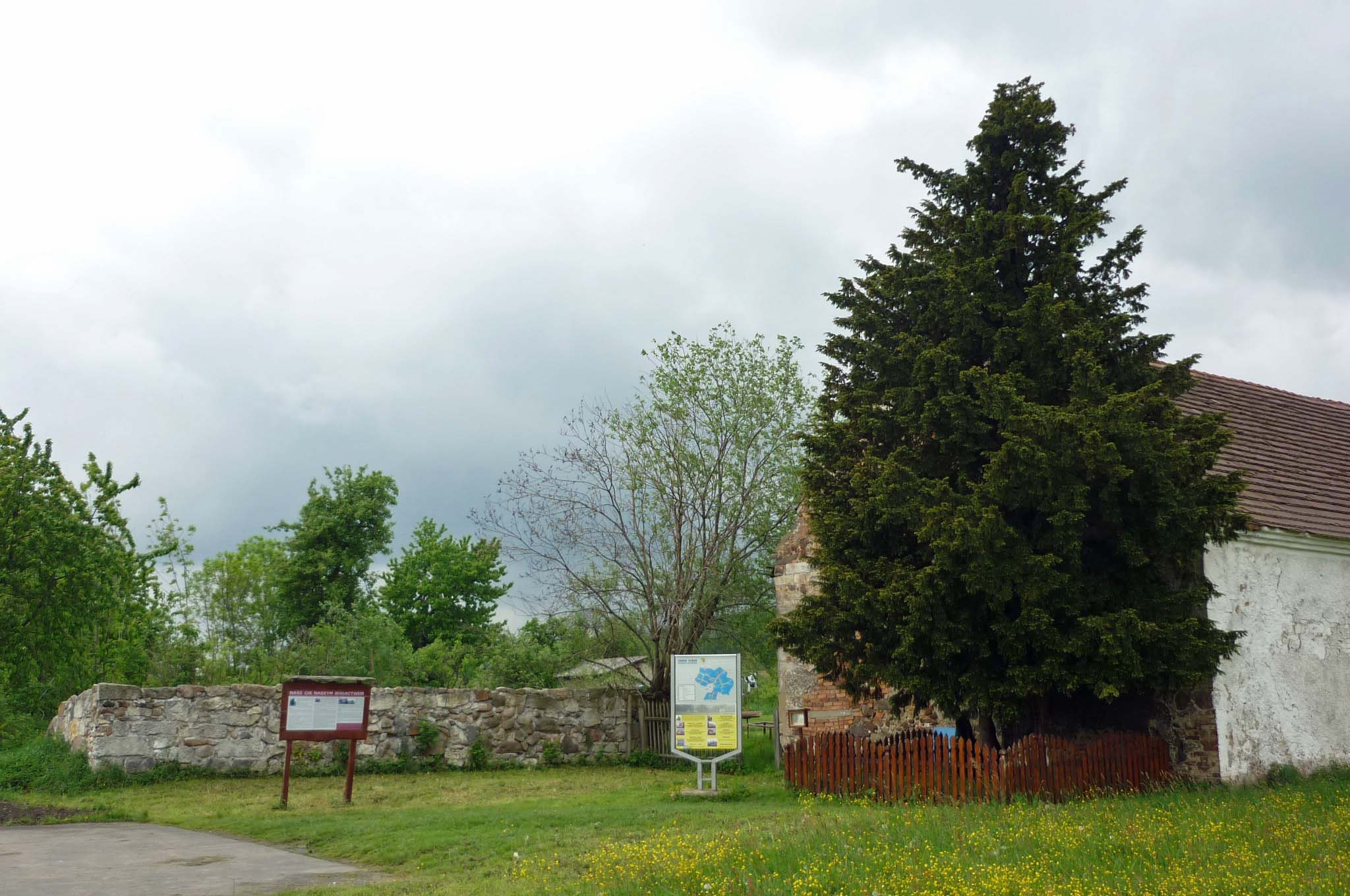 Die Eibe von Katholisch Hennersdorf - ältester Baum Polens